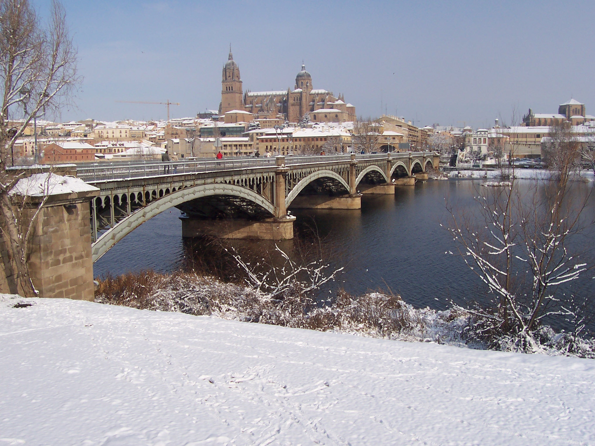 Puente Enrique Estevan sobre el río Tormes, Salamanca